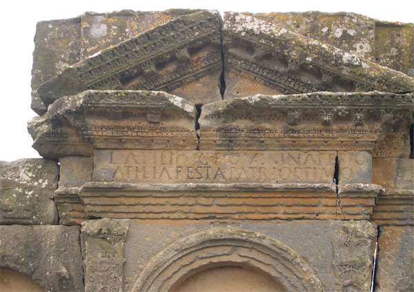 Mausoleo de los Atilios en Sádaba (Zaragoza, España) CIL II 2973